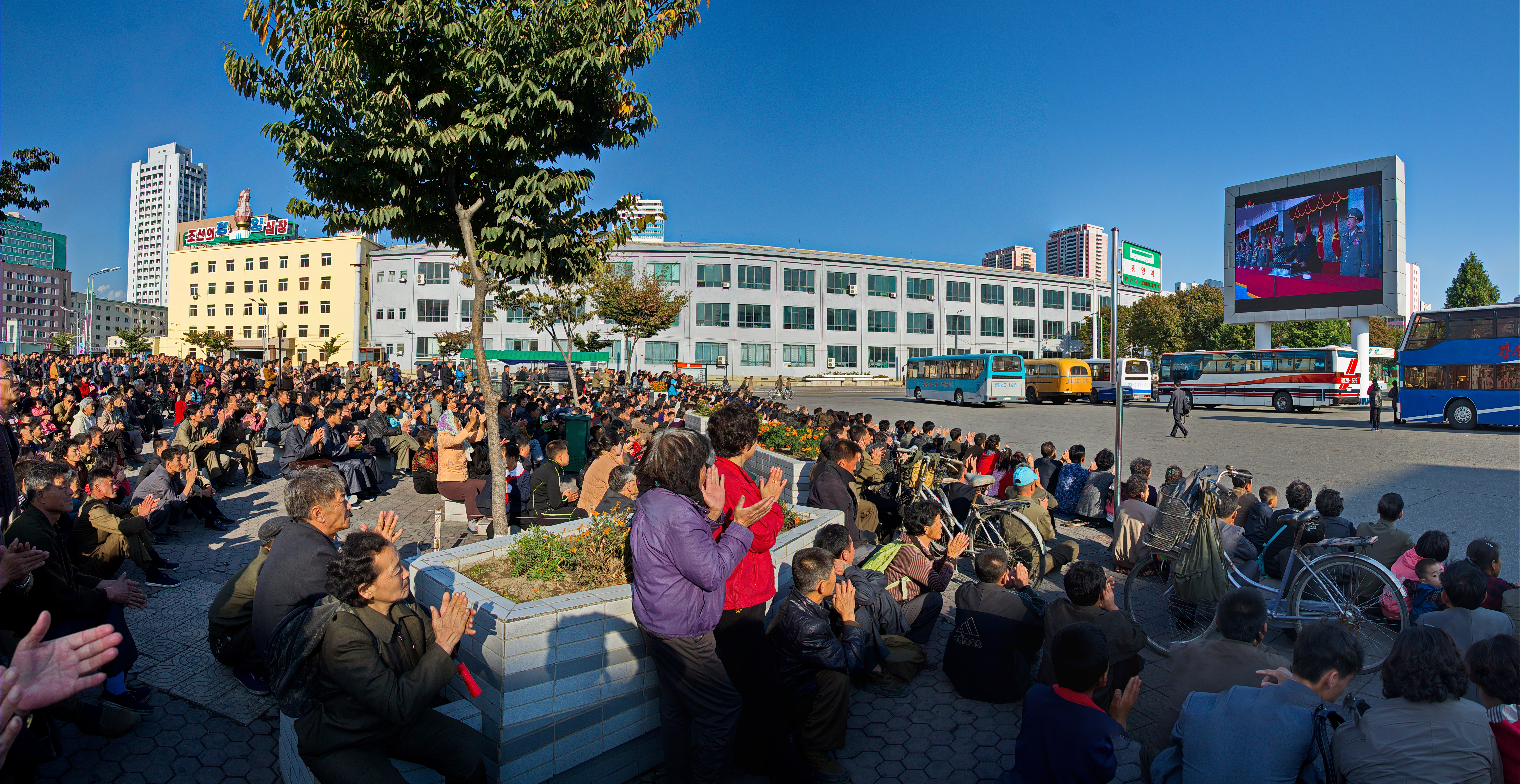 Nordkorea 2015 - Pjöngjang - Public Viewing am Bahnhofsplatz